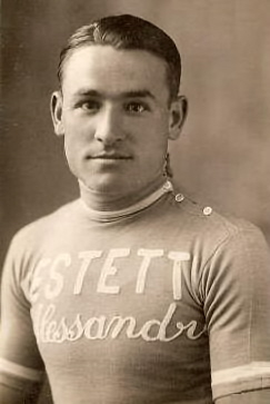 El ciclista Marià Cañardo i Lacasta (1906-1987)